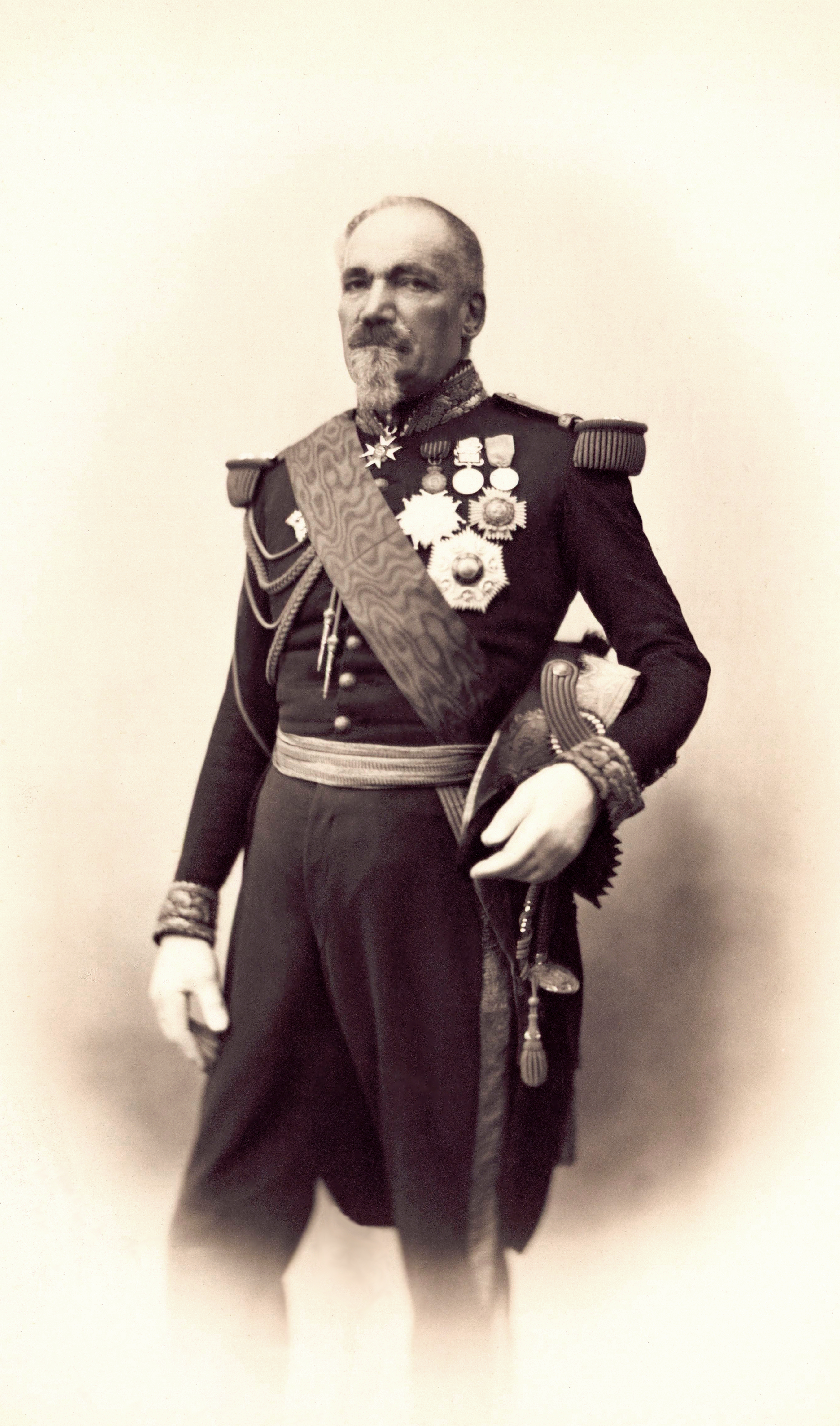 Jacques Camou (1792 - 1868), général français. 1 photographie positive sur papier albuminé, d'après négatif sur plaque de verre au collodion ; 33,5 x 24 cm.